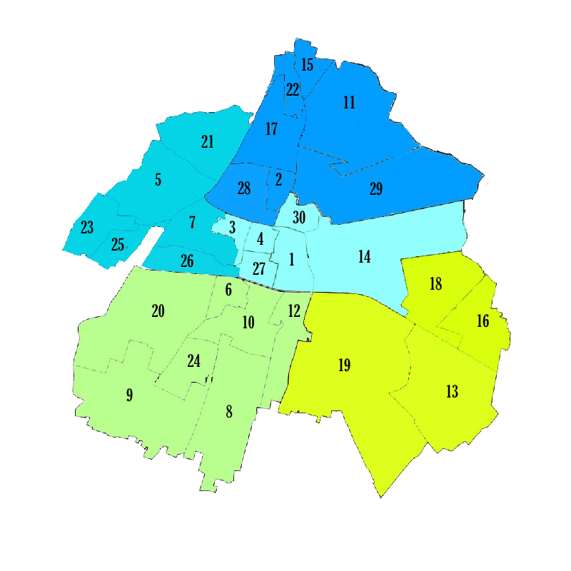 Circoscrizioni_brescia_2